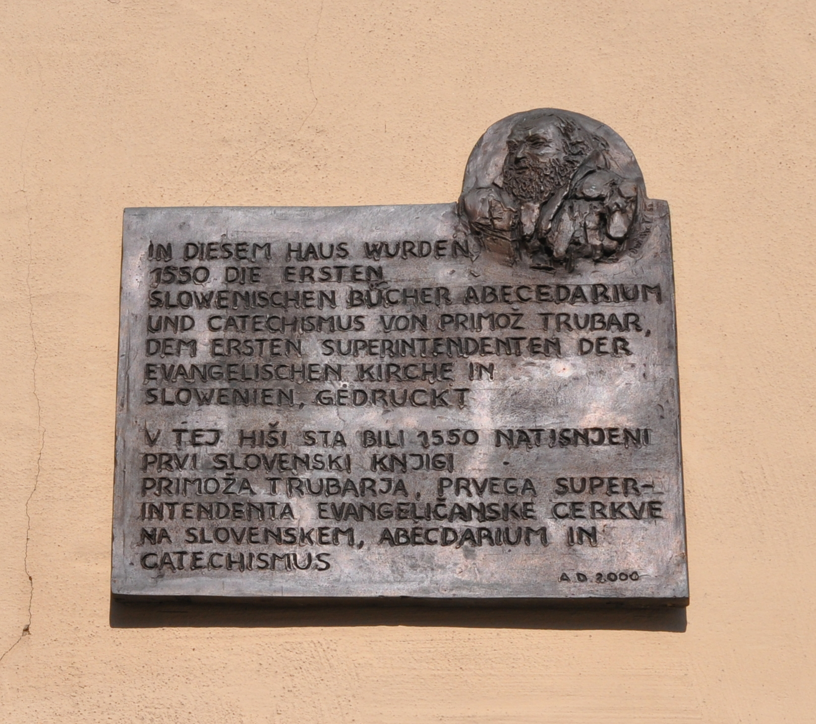 Trubar bilingual memorial plaque in Tübingen